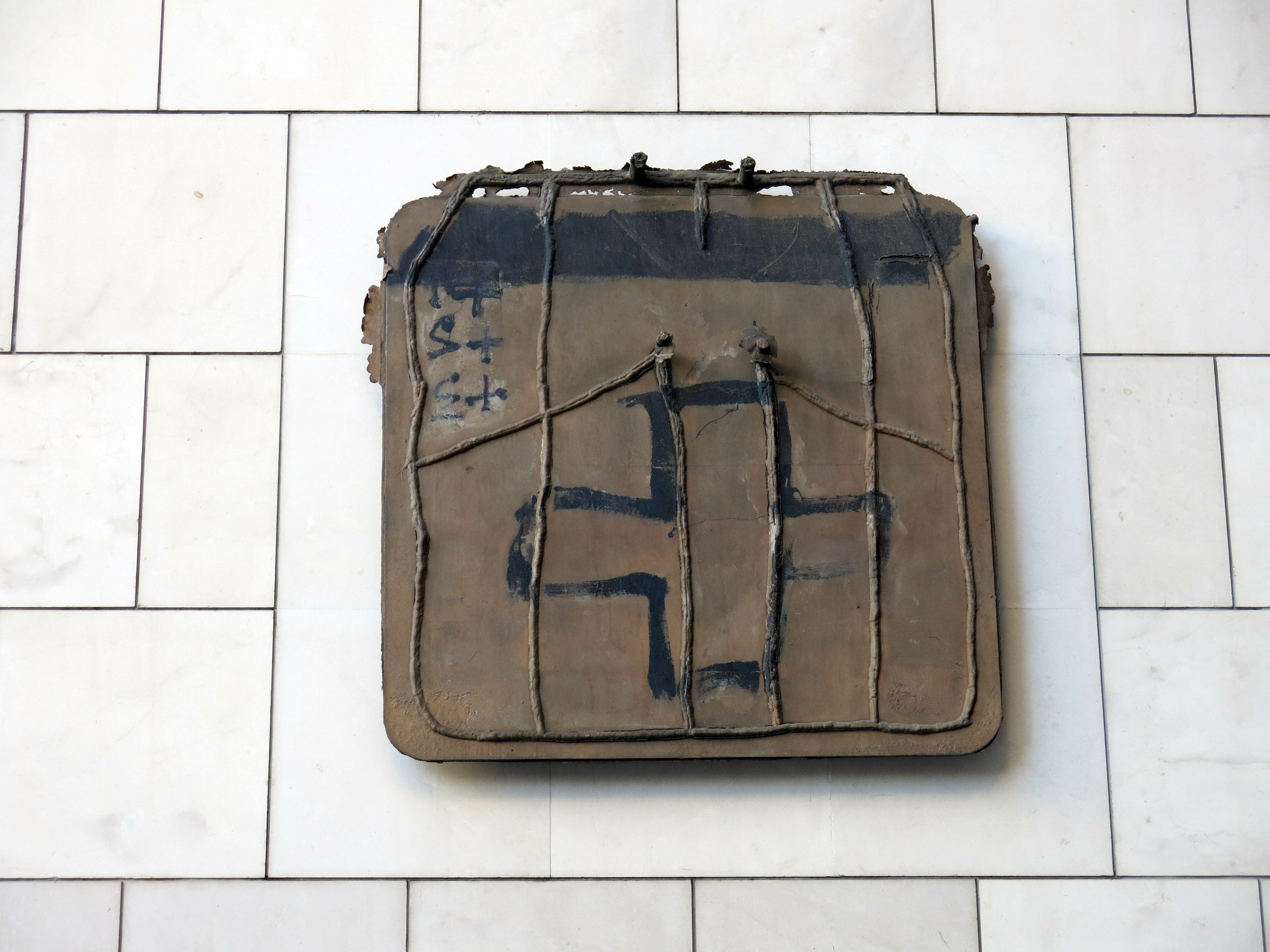 Composició, d'Antoni Tàpies, c. Creu 31 (Girona)